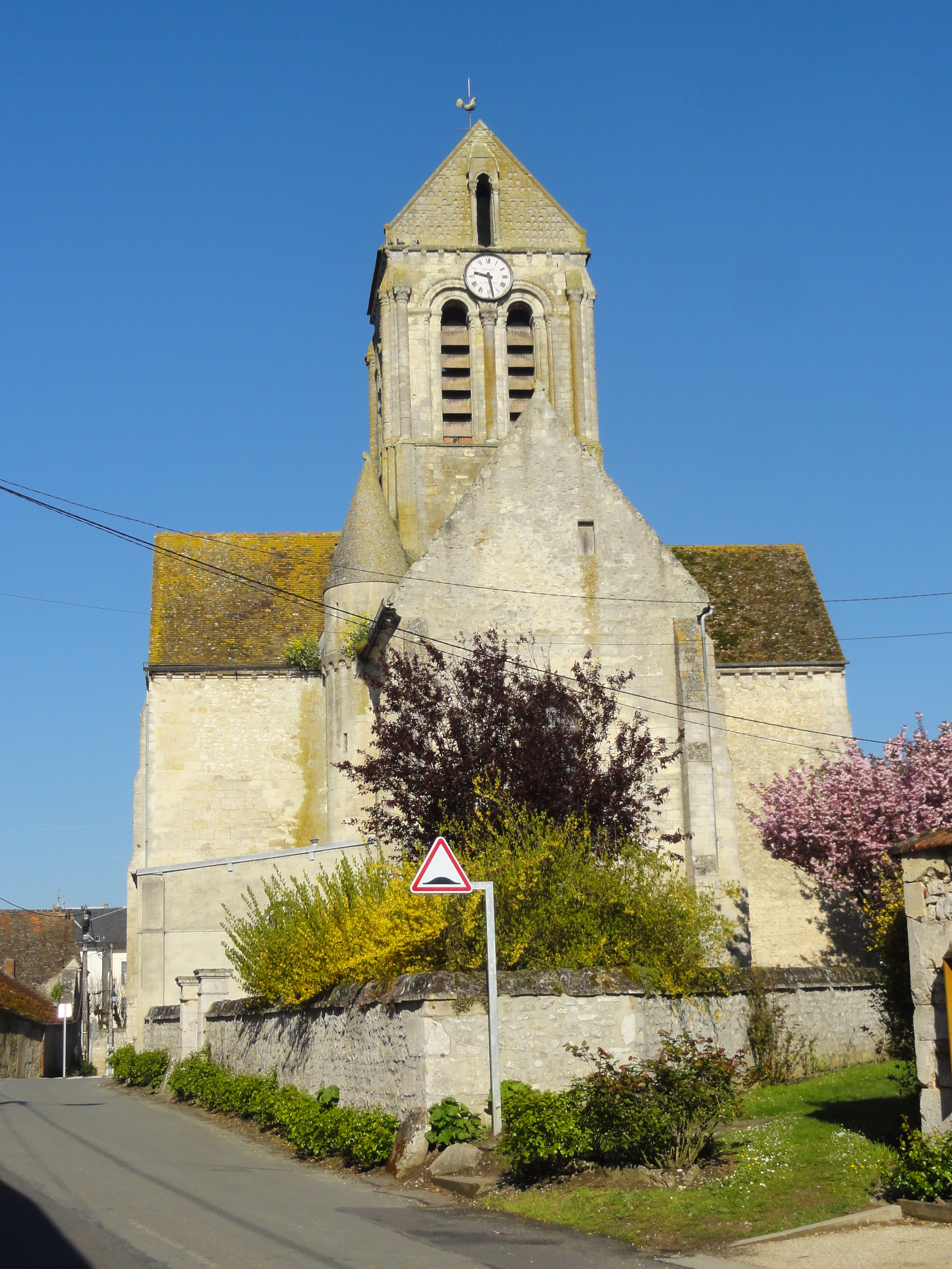 Église Notre-Dame-de-la-Nativité de Lavilletertre - voir titre.